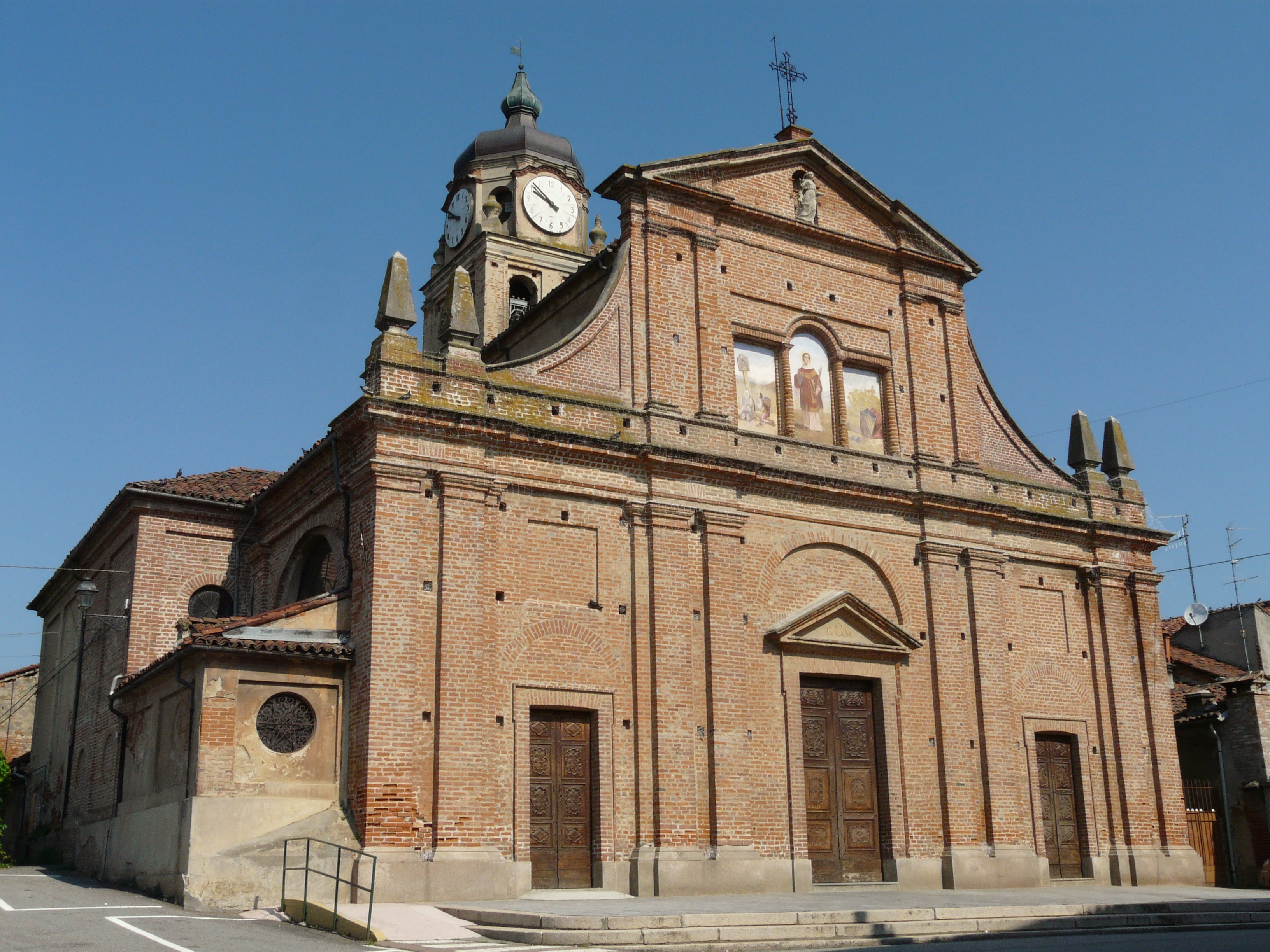 Chiesa di San Vincenzo, Mirabello Monferrato, Piemonte, Italia